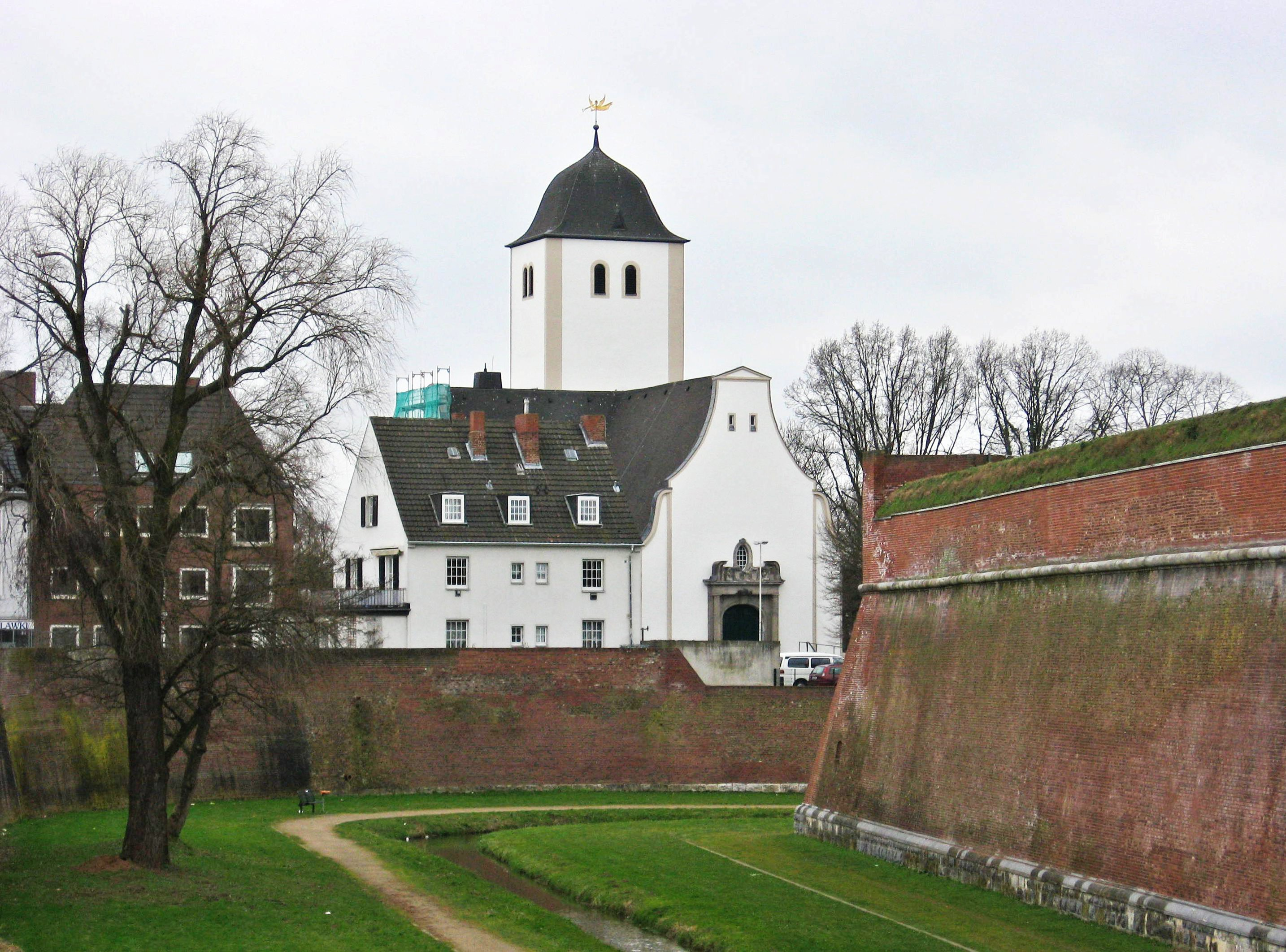 Turm in Jülich